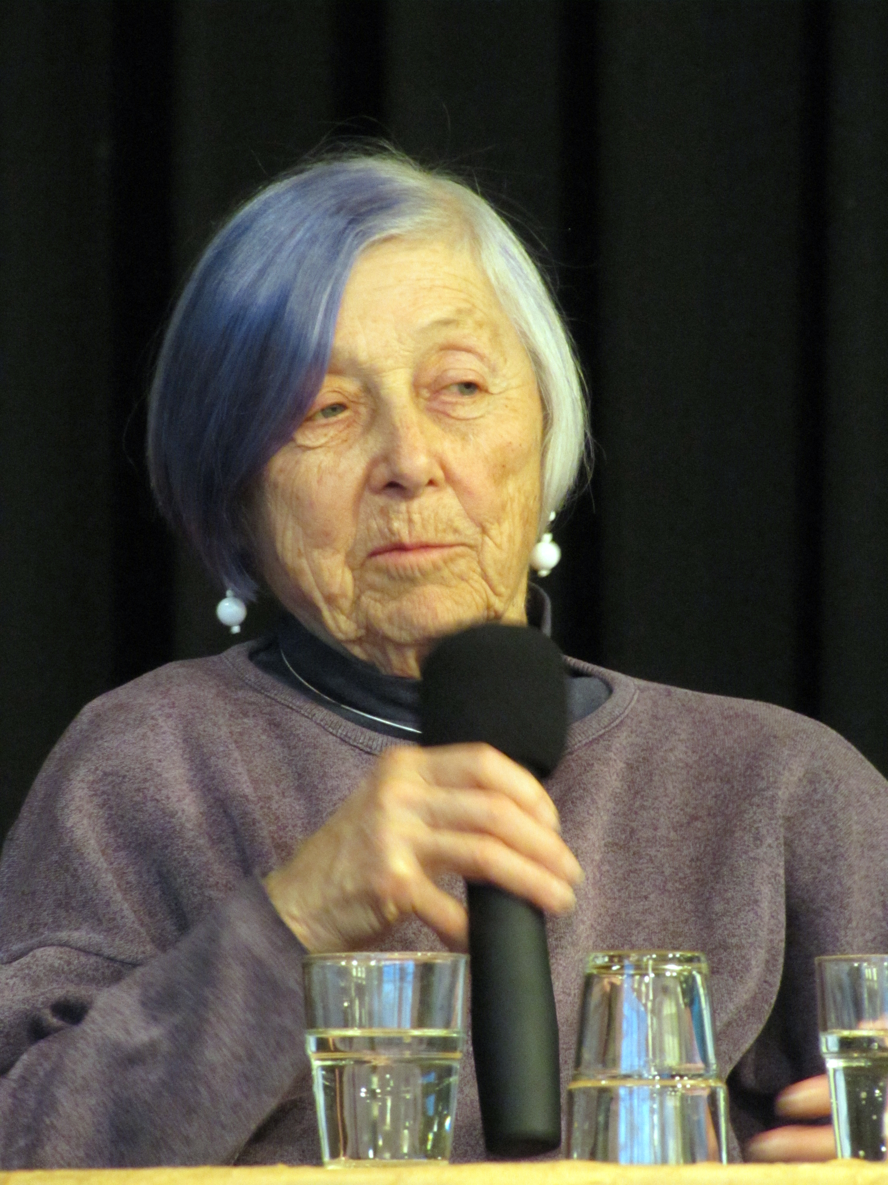 Silvia Tennenbaum, 2012, bei einem Podiumsgespräch, anlässlich der Veranstaltungsreihe Frankfurt liest ein Buch. Autorin des historischen Familienromans aus der Zeit zwischen 1903 und 1945, Straßen von gestern, in Ffm.